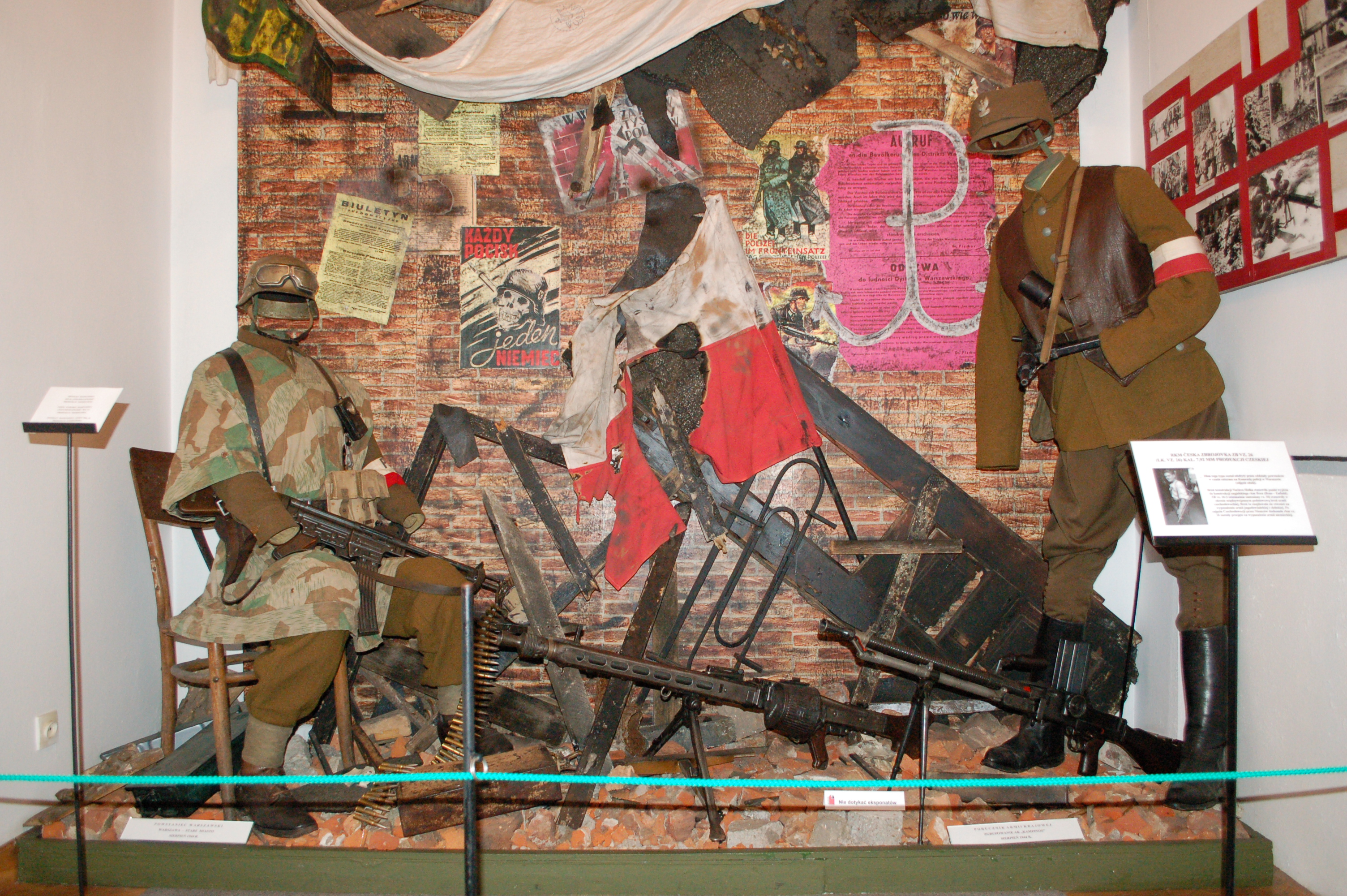 Sochaczew